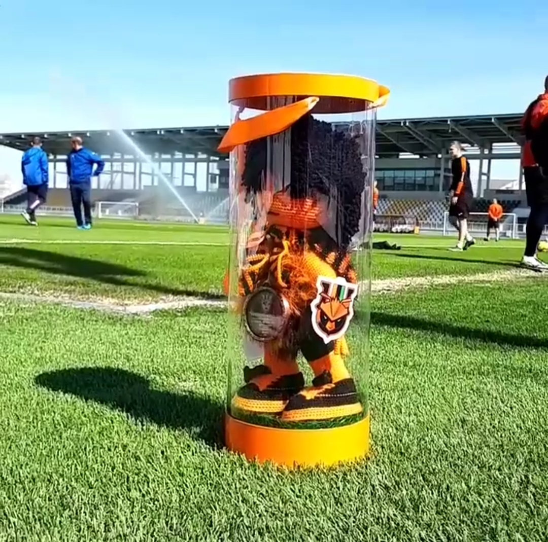 FC "Ural" fans' prize for the best player of the month / season